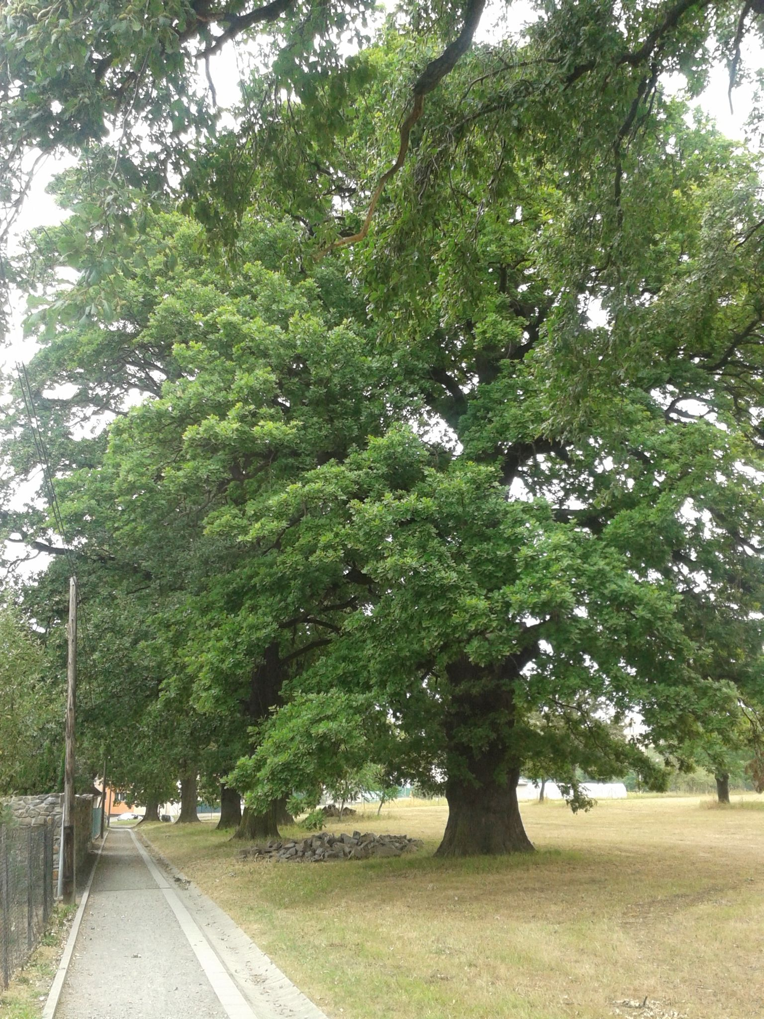 Dubová alej v Raduni (srpen 2015)